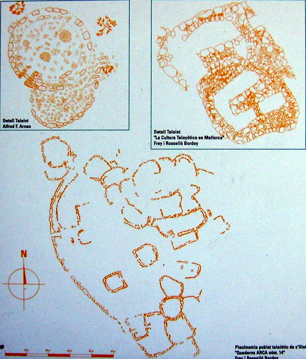 Lageskizze des Talayotischen Dorfes auf der Infotafel